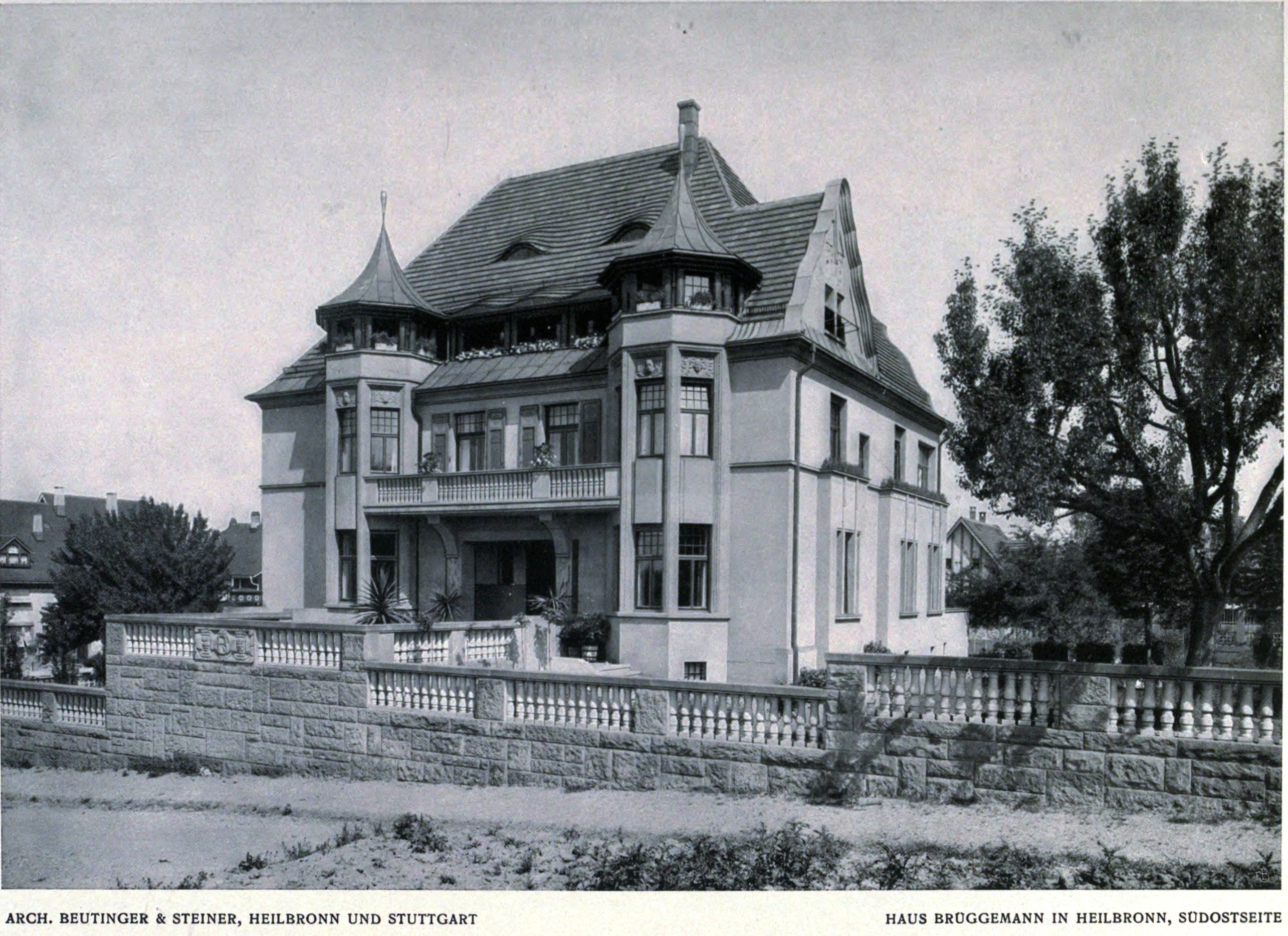 Villa des Fabrikanten Brüggemann, später Villa Pfleiderer genannt, in Heilbronn, Lerchenstraße 79, nicht erhalten